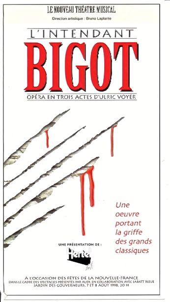 Programme de la version concert de l'Opéra L'Intendant Bigot, présentée au Jardin des Gouverneurs de Québec, dans le cadre des Fêtes de la Nouvelle-France, les 7 et 8 août 1998